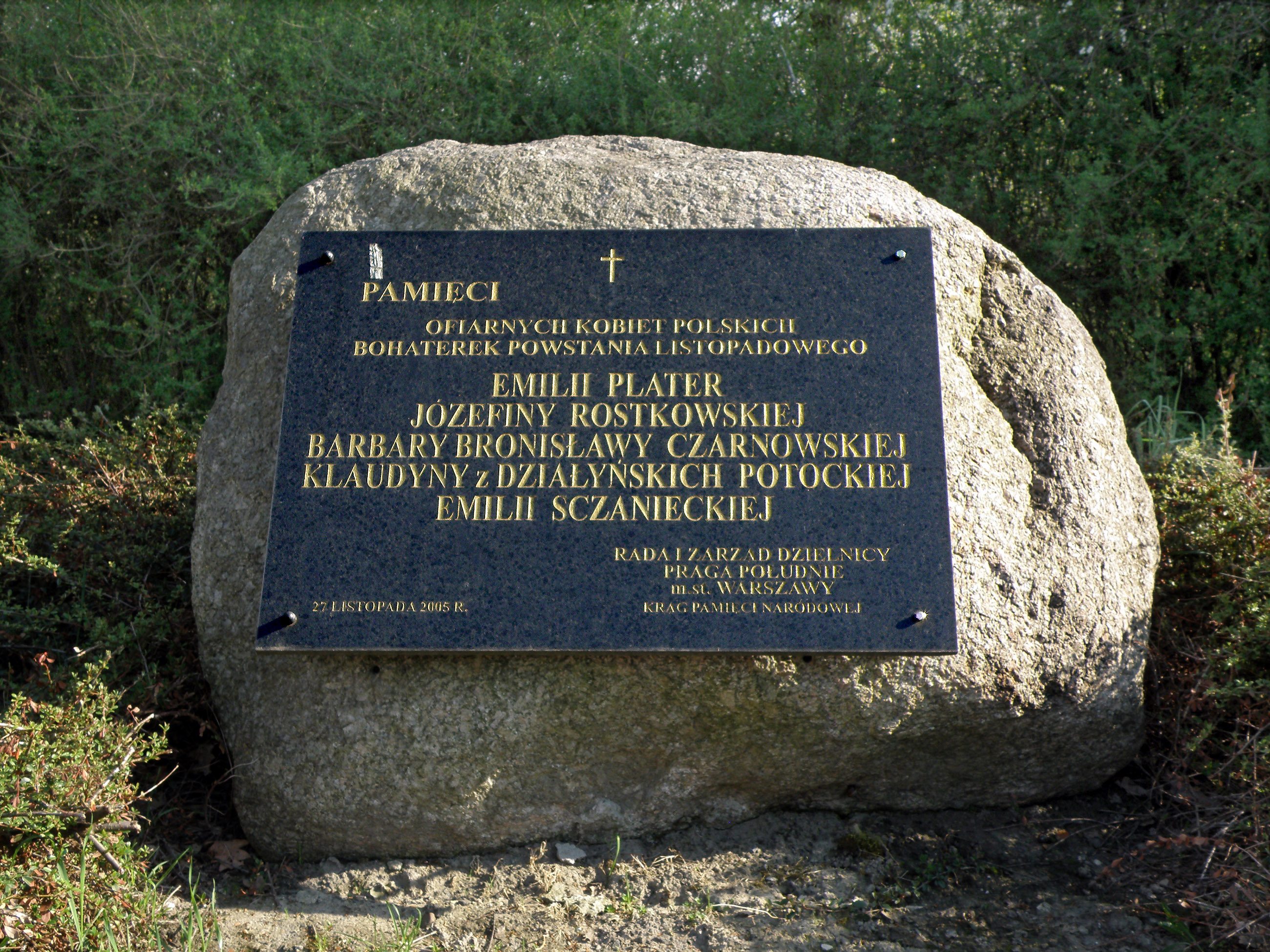 Olszynka Grochowska - Aleja Chwały, ul. Traczy